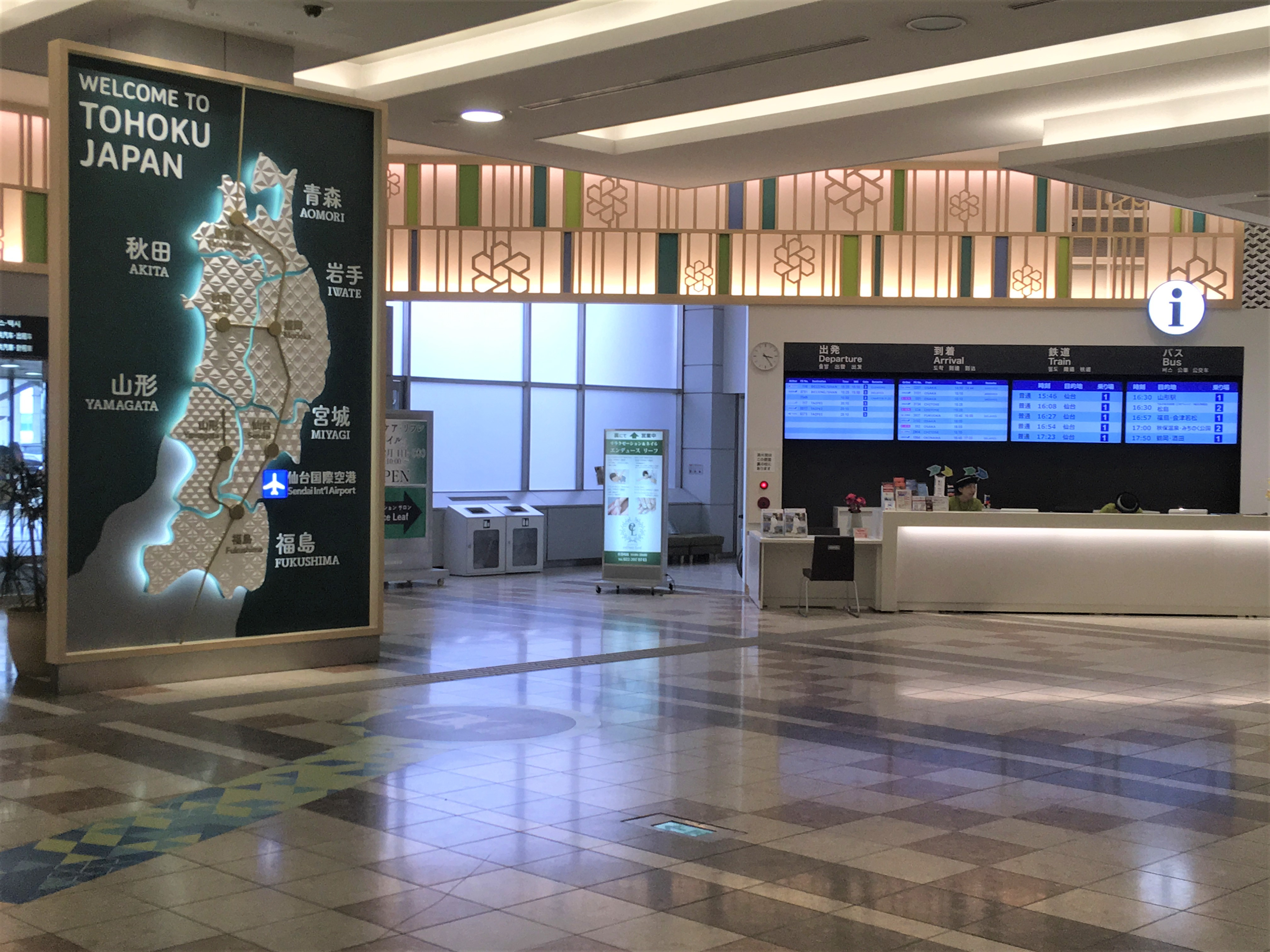 民営化後にリニューアルされた、仙台空港国内線到着エリアと総合案内所（2018年5月）